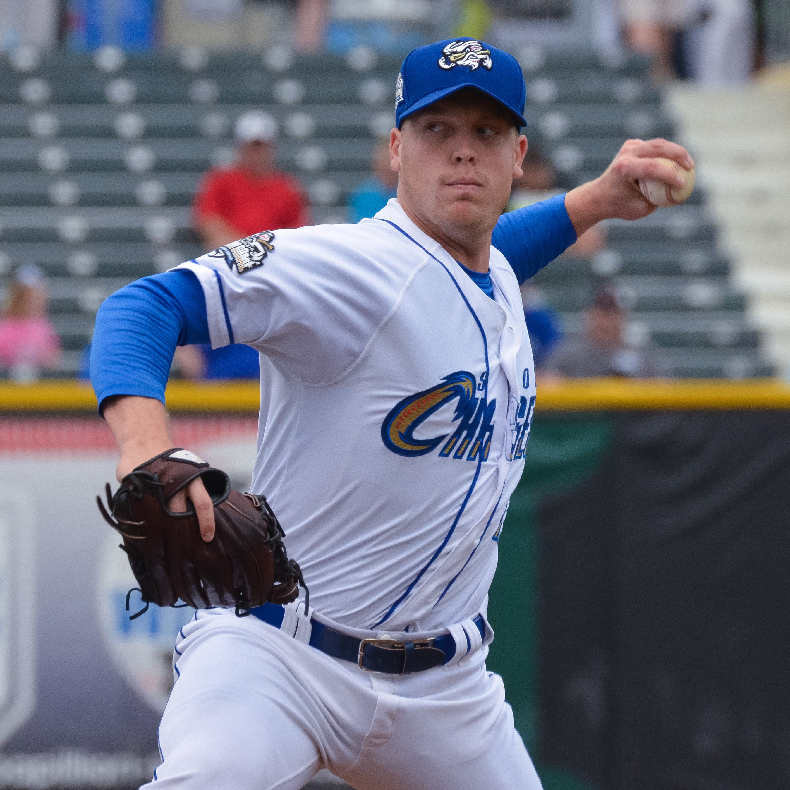 Buddy Baumann